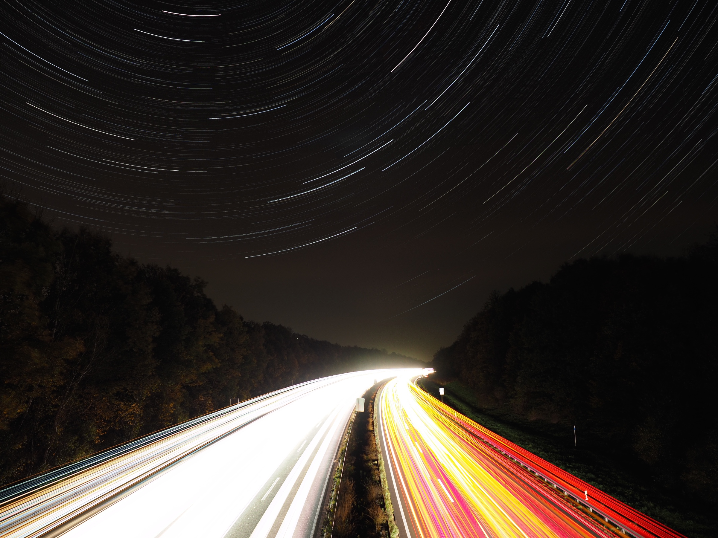 Lichtspuren von Scheinwerfern und Rückleuchten fahrender Autos sowie Sternenspuren durch Bewegung der Erde. Aufnahme entstanden mit Olympus Live Composit. 20s Grundbelichtung welche ca. 250 mal wiederholt wurde.